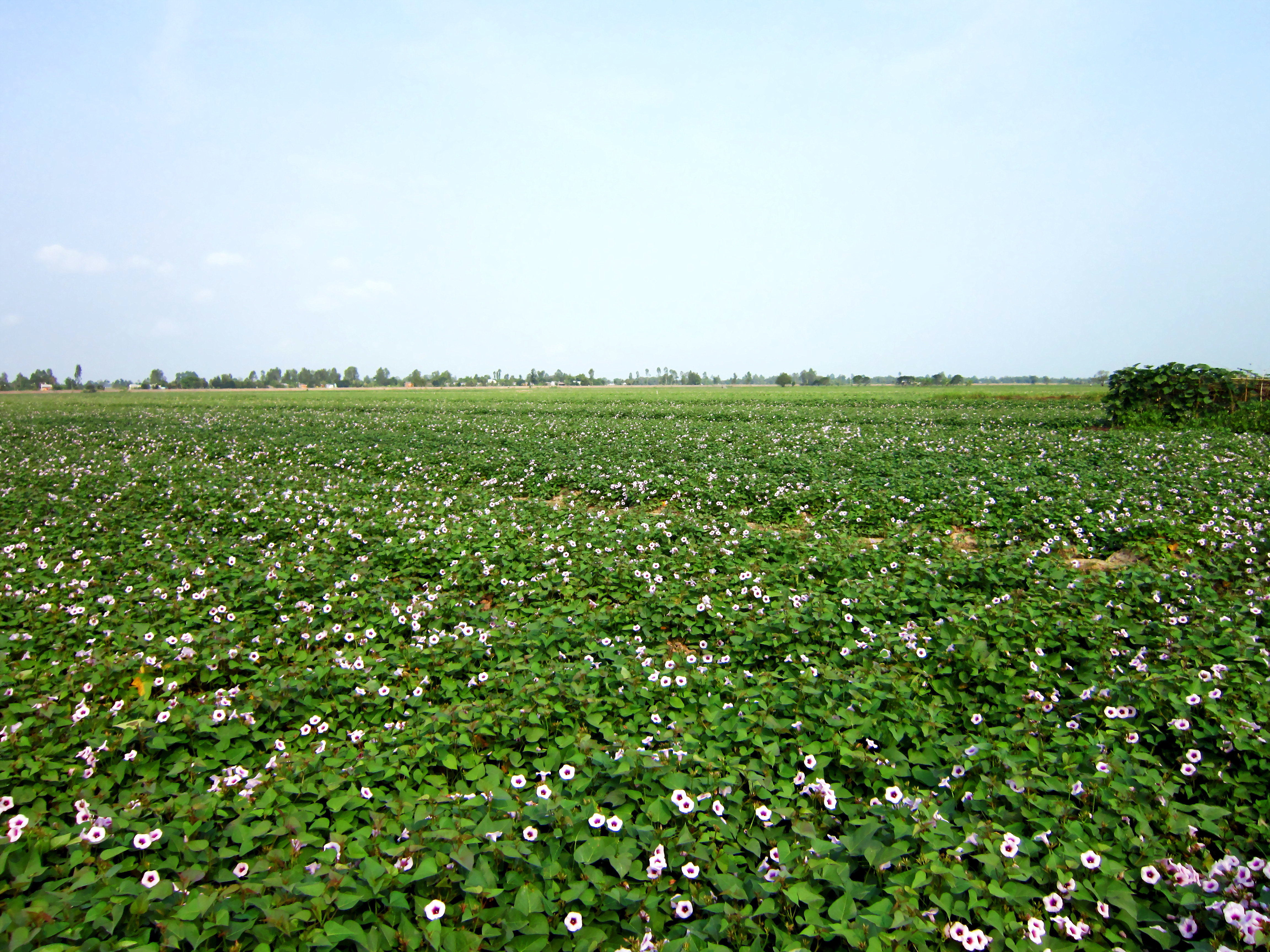 Một trong những cánh đồng trồng khoai lang tím ở huyện Bình Tân, Vĩnh Long, Việt Nam.